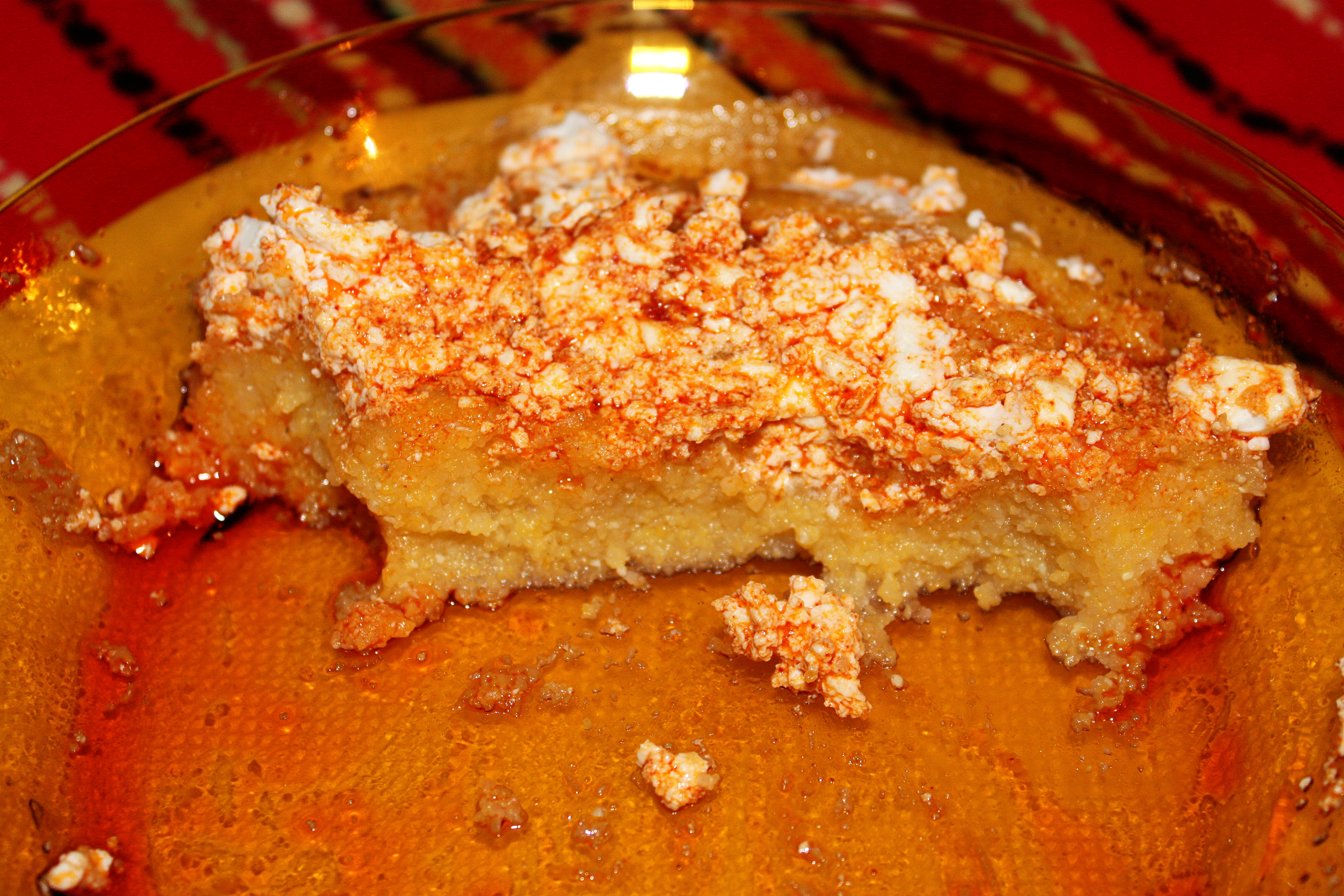 landestypische Speisen, Rhodopen; Bulgarien; Katschamak